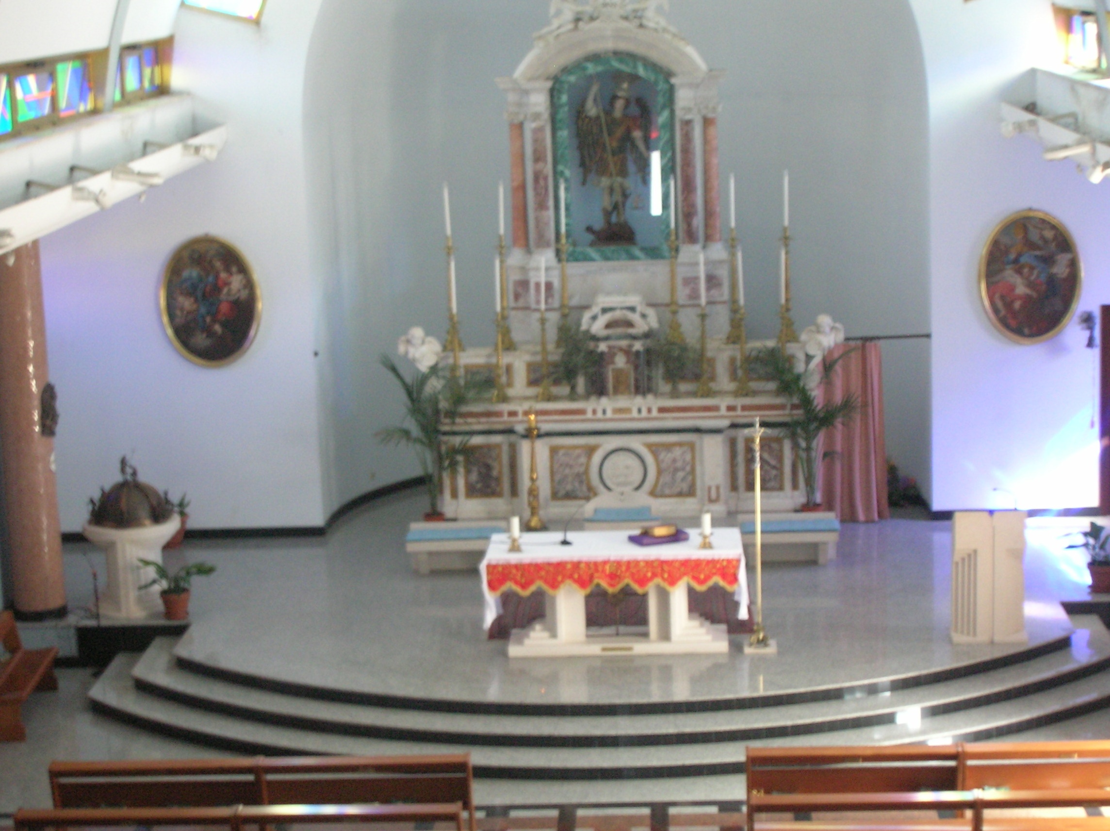 Sturno, provincia di Avellino, Italia - Chiesa di San Michele Arcangelo.